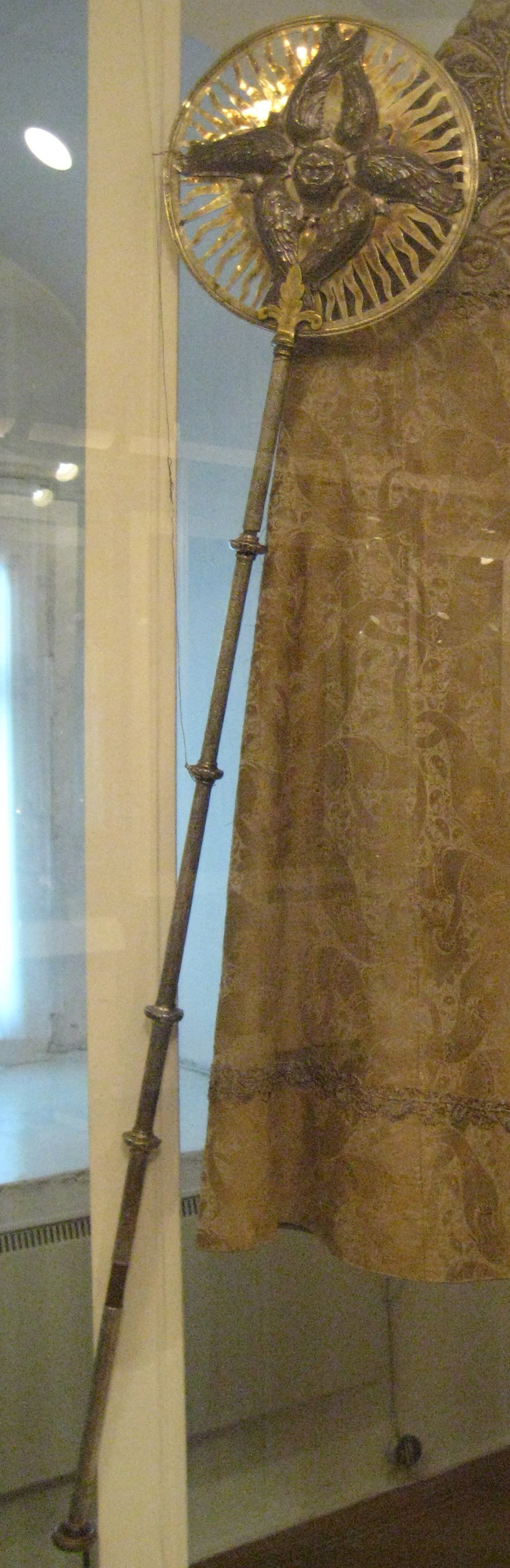 ripida (ceremonial fan, 19 c.) from Pskov museum. рипида